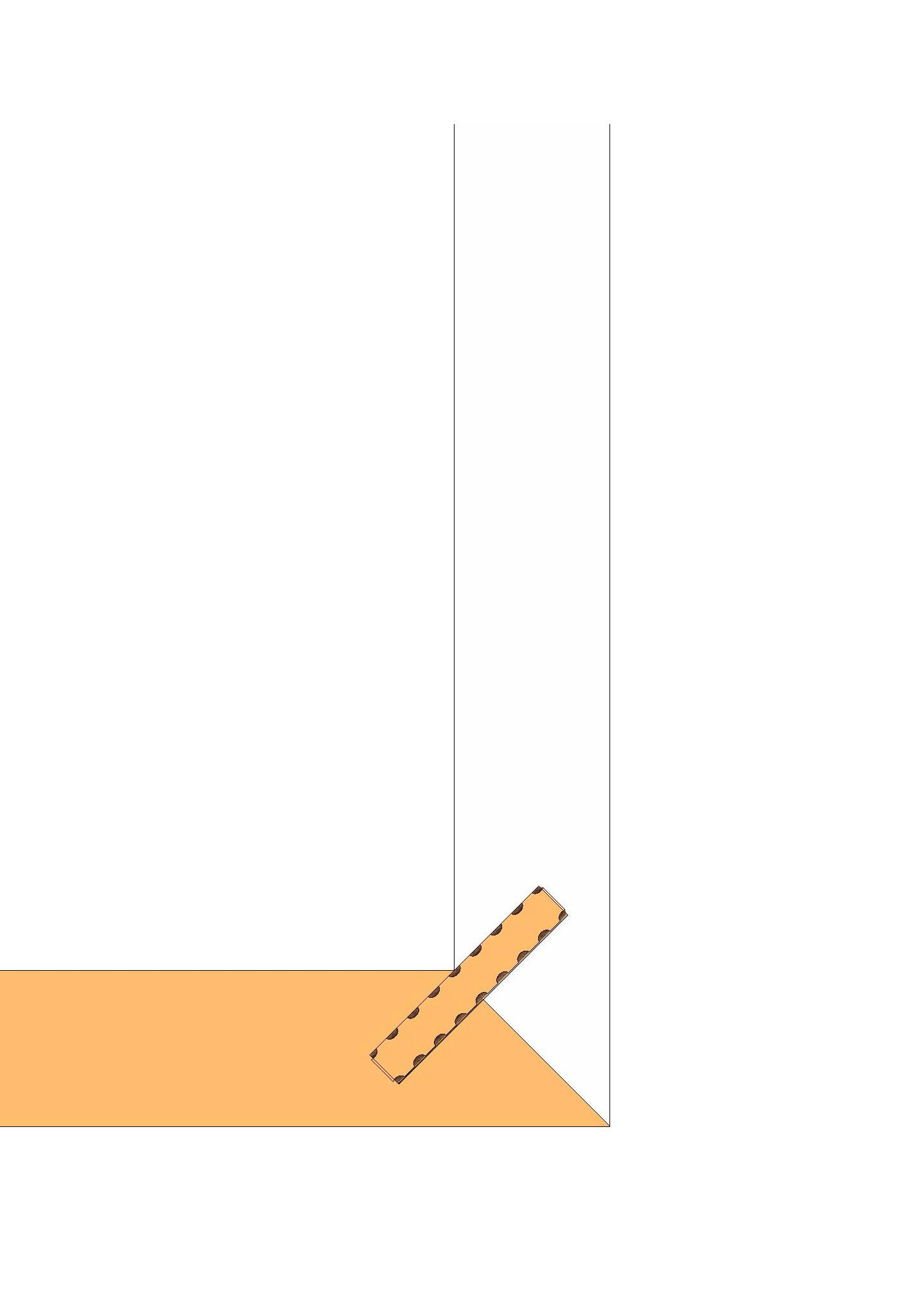 Holz-Eckverbindungen auf Gehrung verleimt mittels Lamello siehe auch Holzverbindung.